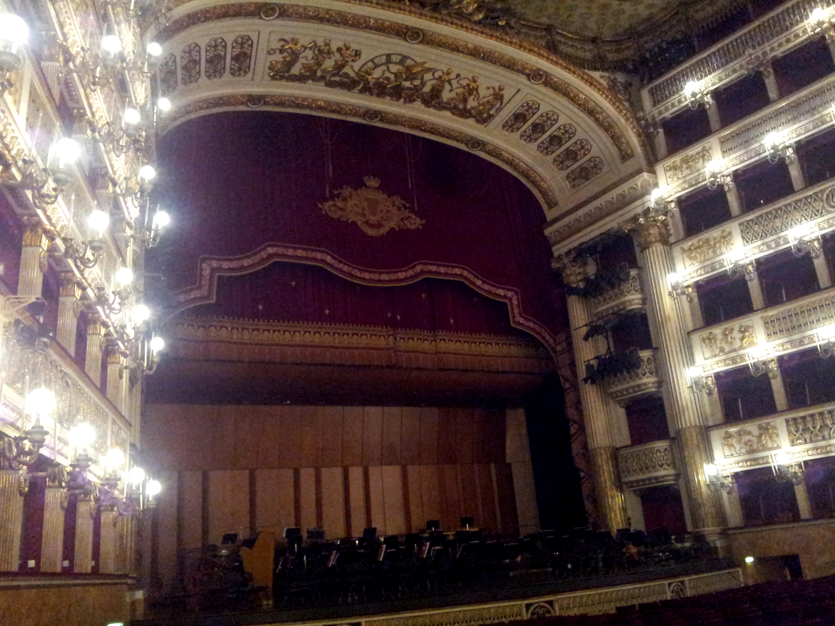 Interno del Real Teatro di San Carlo di Napoli. Vista verso il palcoscenico.